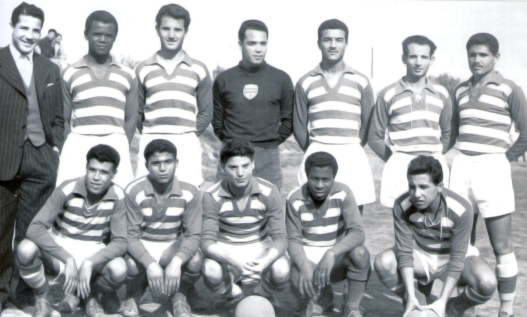 Équipe du Club africain en 1955-1956Debout de gauche à droite : Mounir Kebaili, Rabah Krimi, Skander Medelgi, Mohamed Ayachi, Ahmed Felah (Gallard), Rachid Sehili, Taoufik BokriAccroupis de gauche à droite : Larbi Karbass, Hassen Zlassi, Hédi Hamoudia, Larbi Touati, Abdelaziz Dahmani